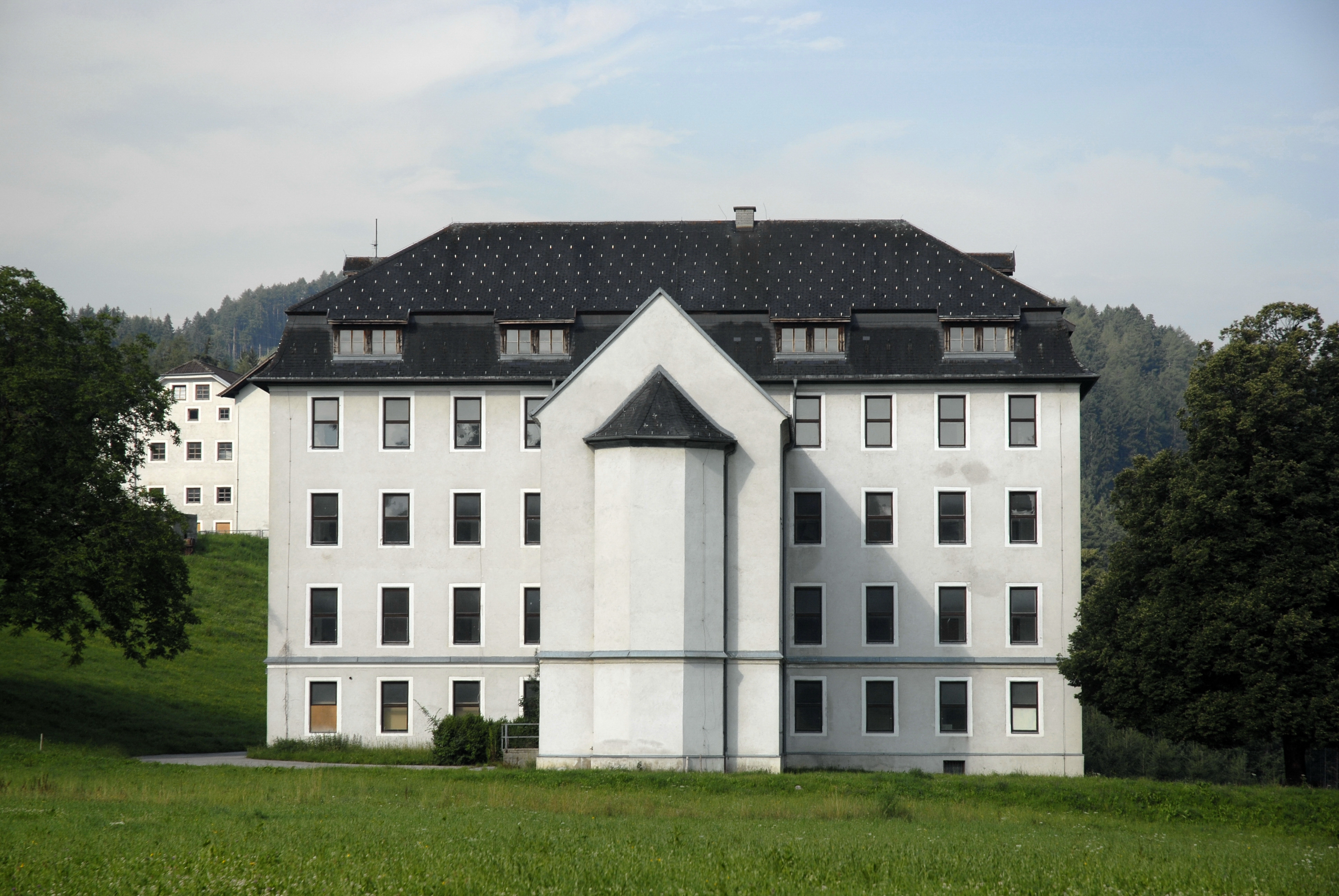 Stachelburg in Volders, Schulgebäude Josefinum This media shows the remarkable cultural object in the Austrian state of Tyrol listed by the Tyrolean Art Cadastre with the ID 58658. (on tirisMaps, pdf, more images on Commons, Wikidata)